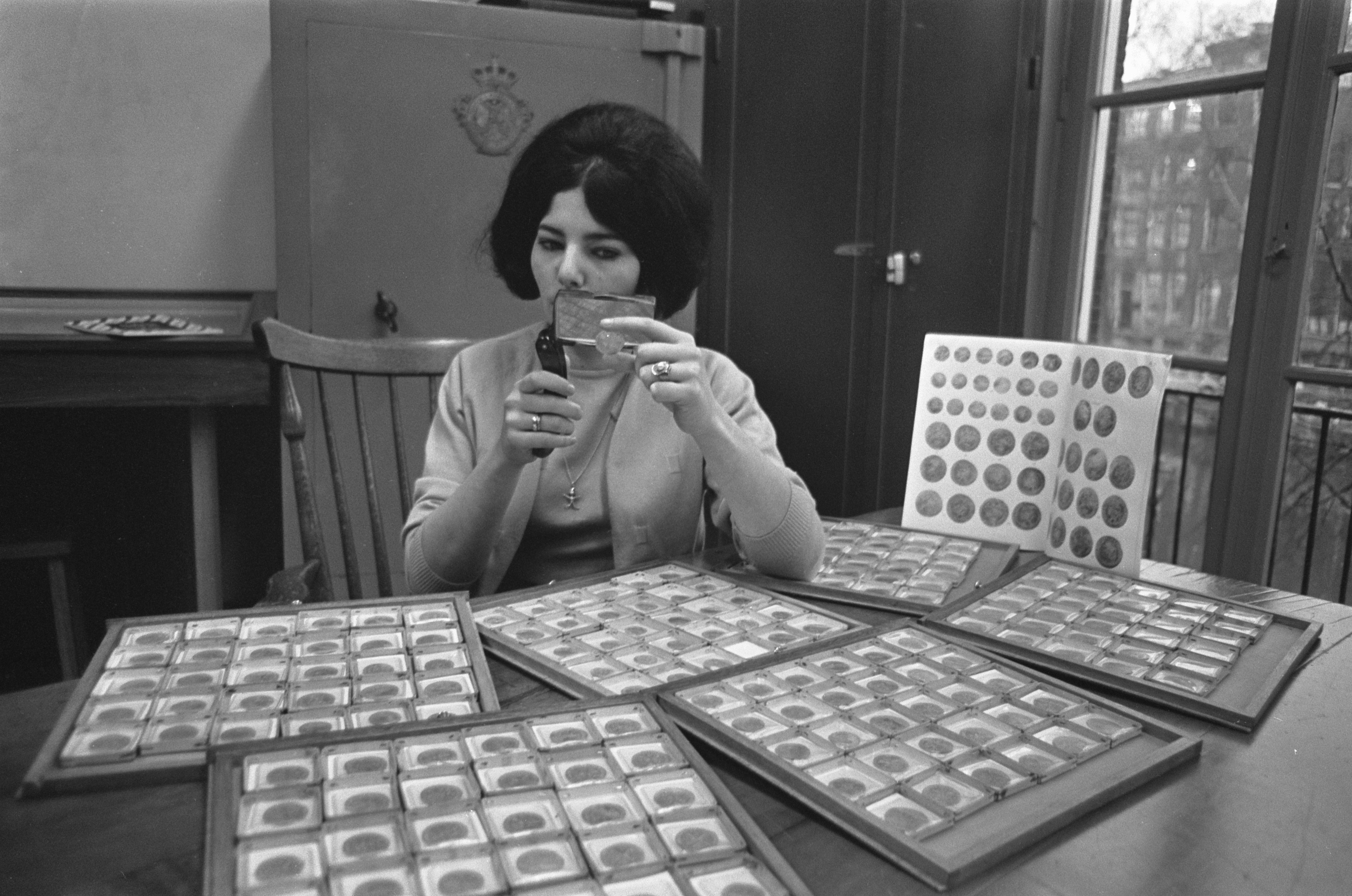 Collectie / Archief : Fotocollectie Anefo Reportage / Serie : Serooskerker gouden munten worden geveild Beschrijving : De munten worden letterlijk onder de loupe genomen Datum : 14 november 1966 Locatie : Serooskerke, Zeeland Trefwoorden : goud, munten, veilingen Fotograaf : Fotograaf Onbekend / Anefo, Nijs, Jac. de / Anefo Auteursrechthebbende : Nationaal Archief Materiaalsoort : Negatief (zwart/wit) Nummer archiefinventaris : bekijk toegang 2.24.01.05 Bestanddeelnummer : 919-7899